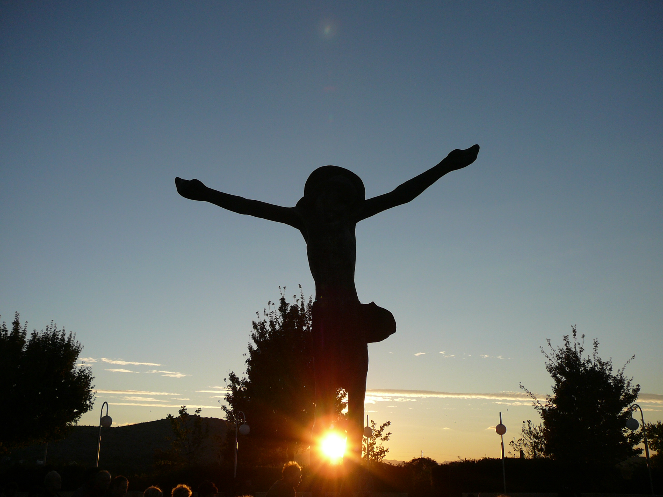 Gesú risorto a Međugorje